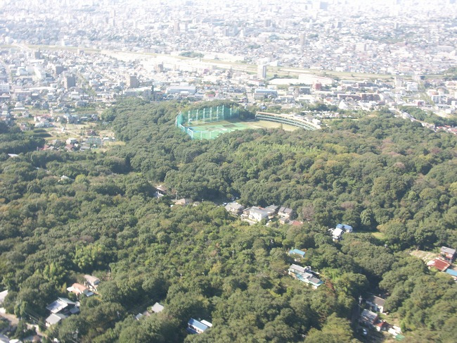 南東より撮影